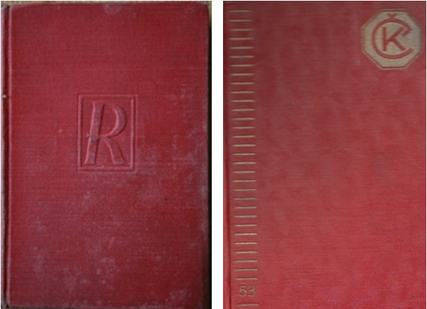 Cervena knihovna - vazby knih